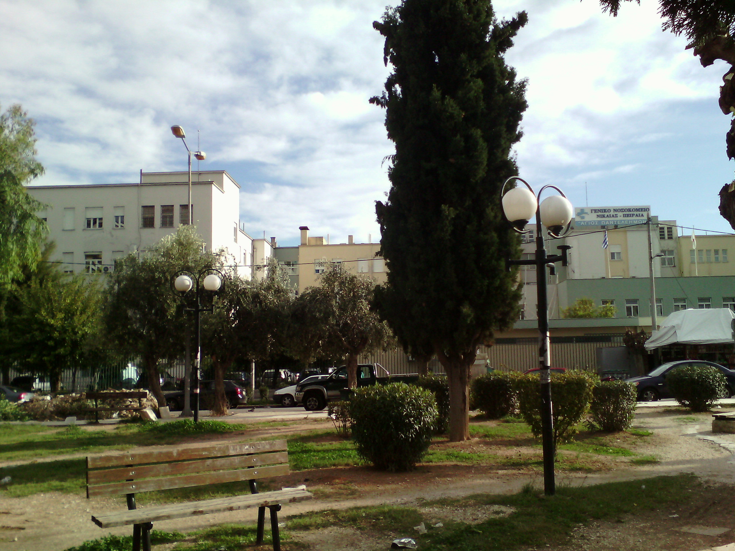 Το Γενικό Νοσοκομείο Νίκαιας Πειραιά "Άγιος Παντελεήμων"